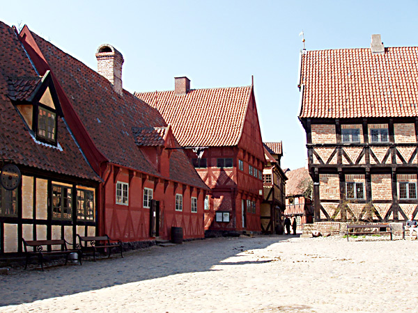 Torvet i Den Gamle By, Århus, Denmark.